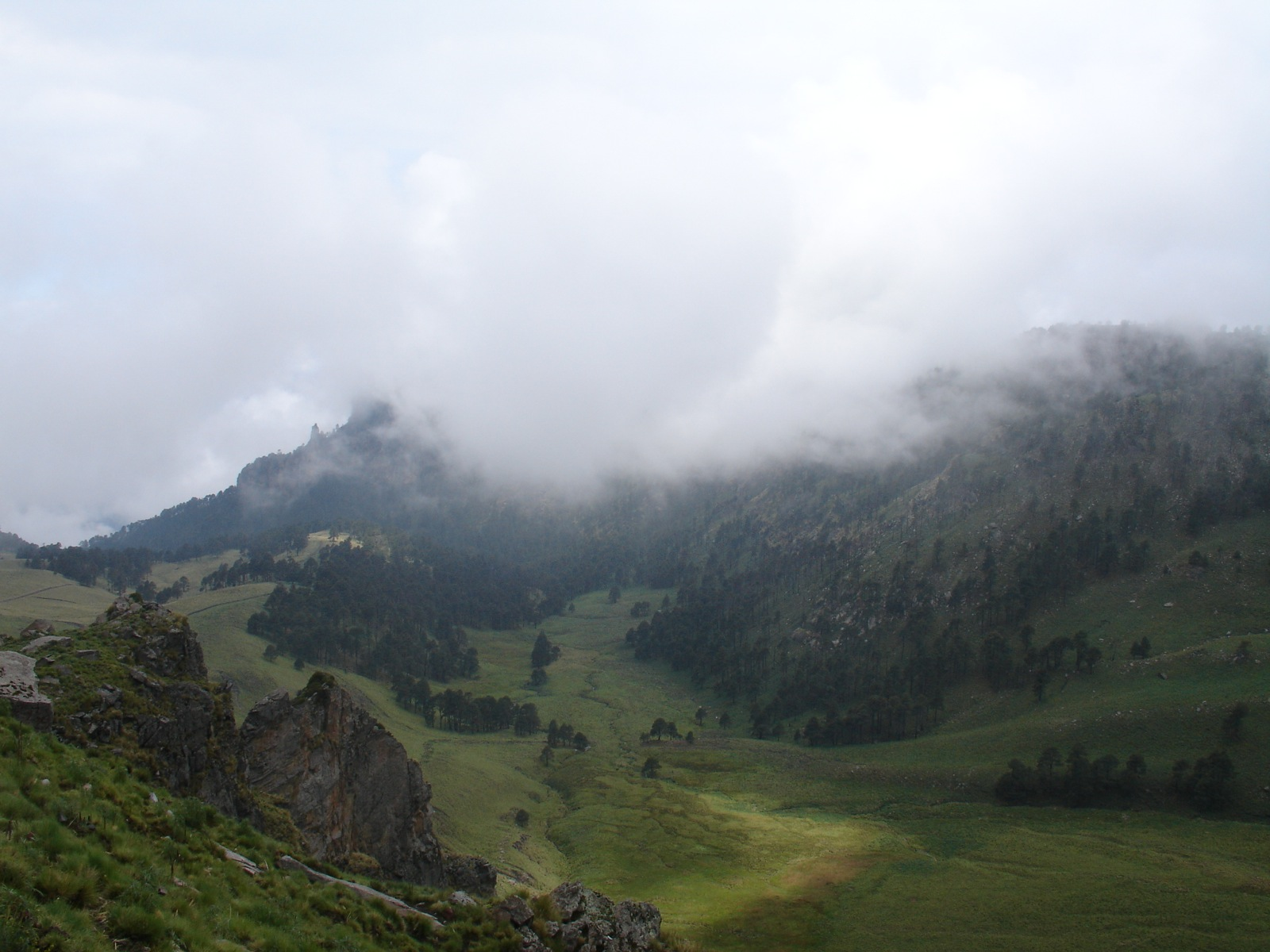 Parque Nacional Izta-popo